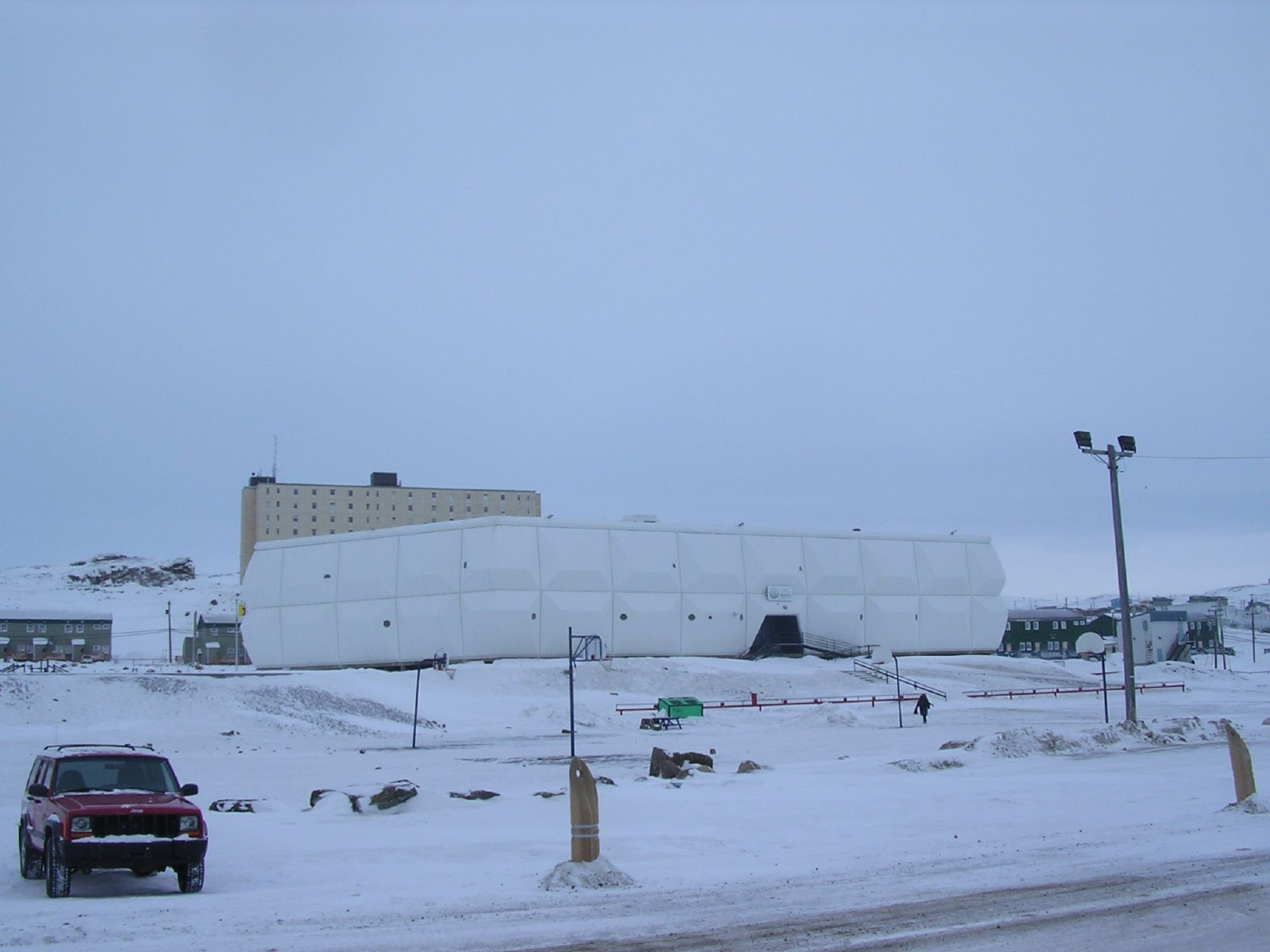 Nakasuk Elementary School